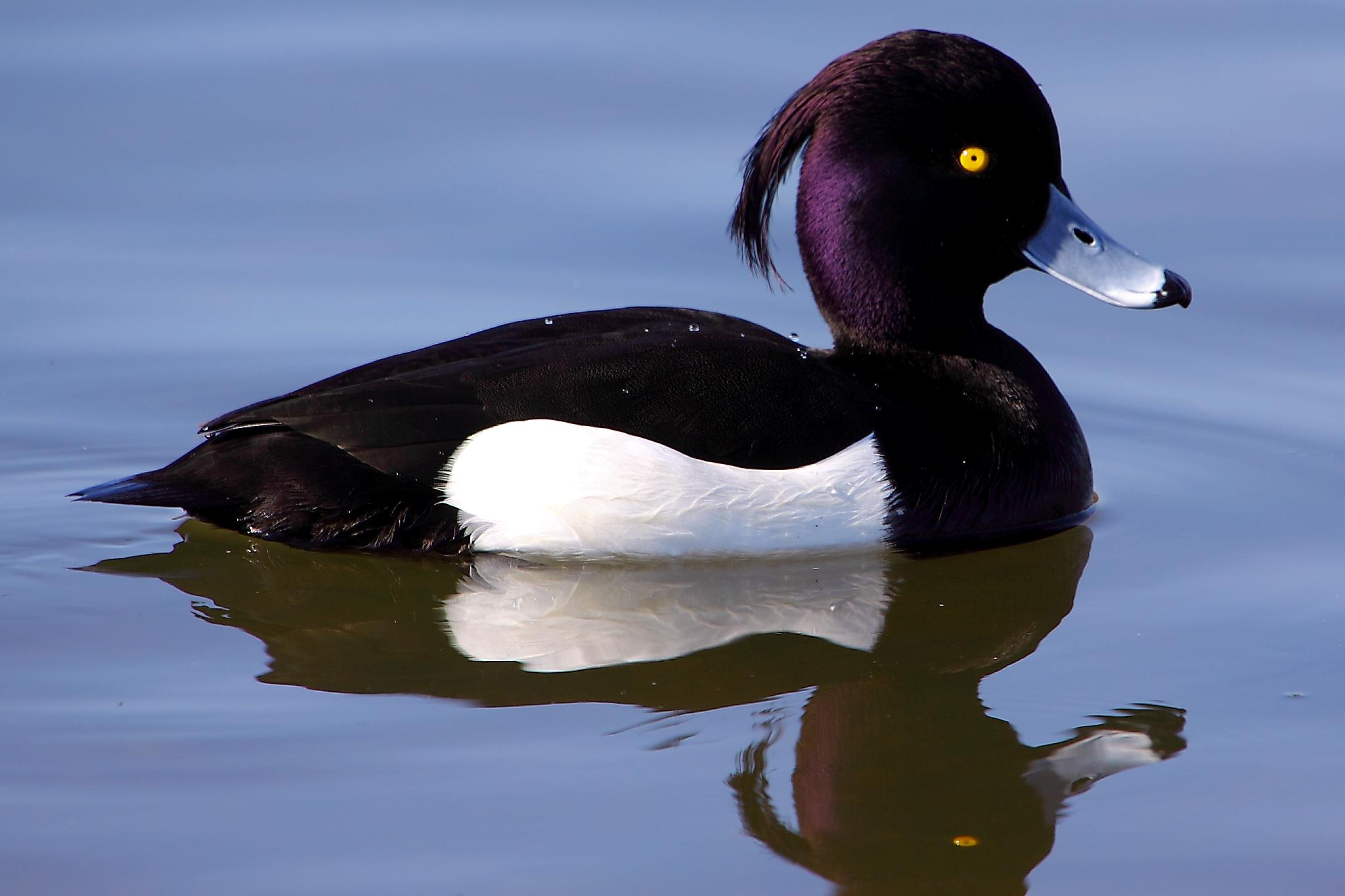 Duck - Richmond Park